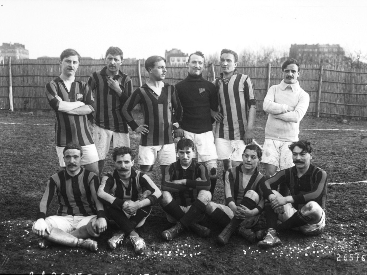 Équipe de football du Club athlétique du XIVe arrondissement le 2 janvier 1913 à Charenton